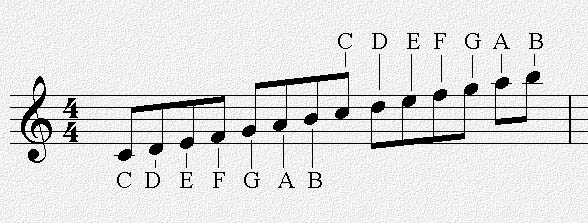 音名